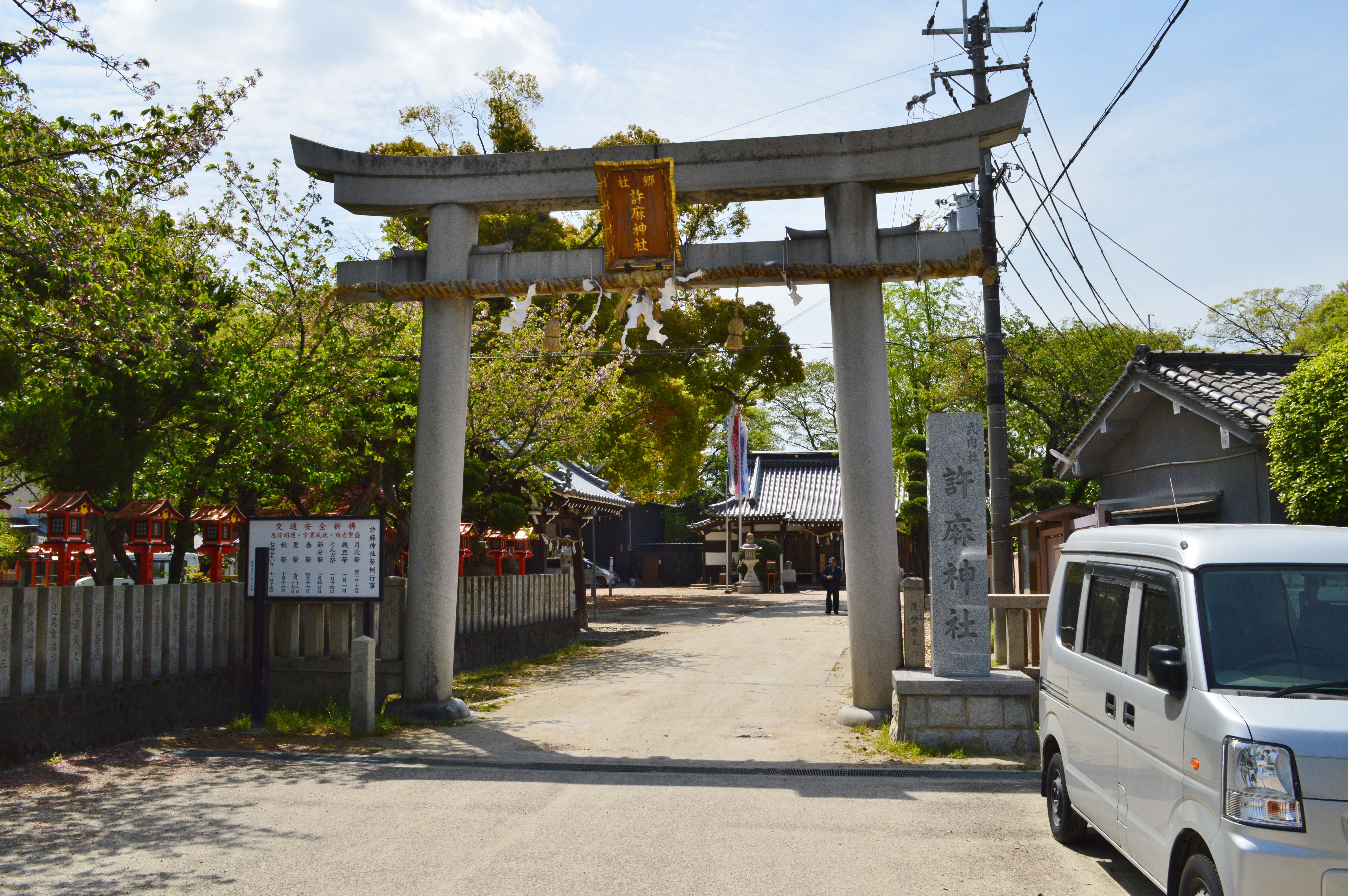 許麻神社 鳥居